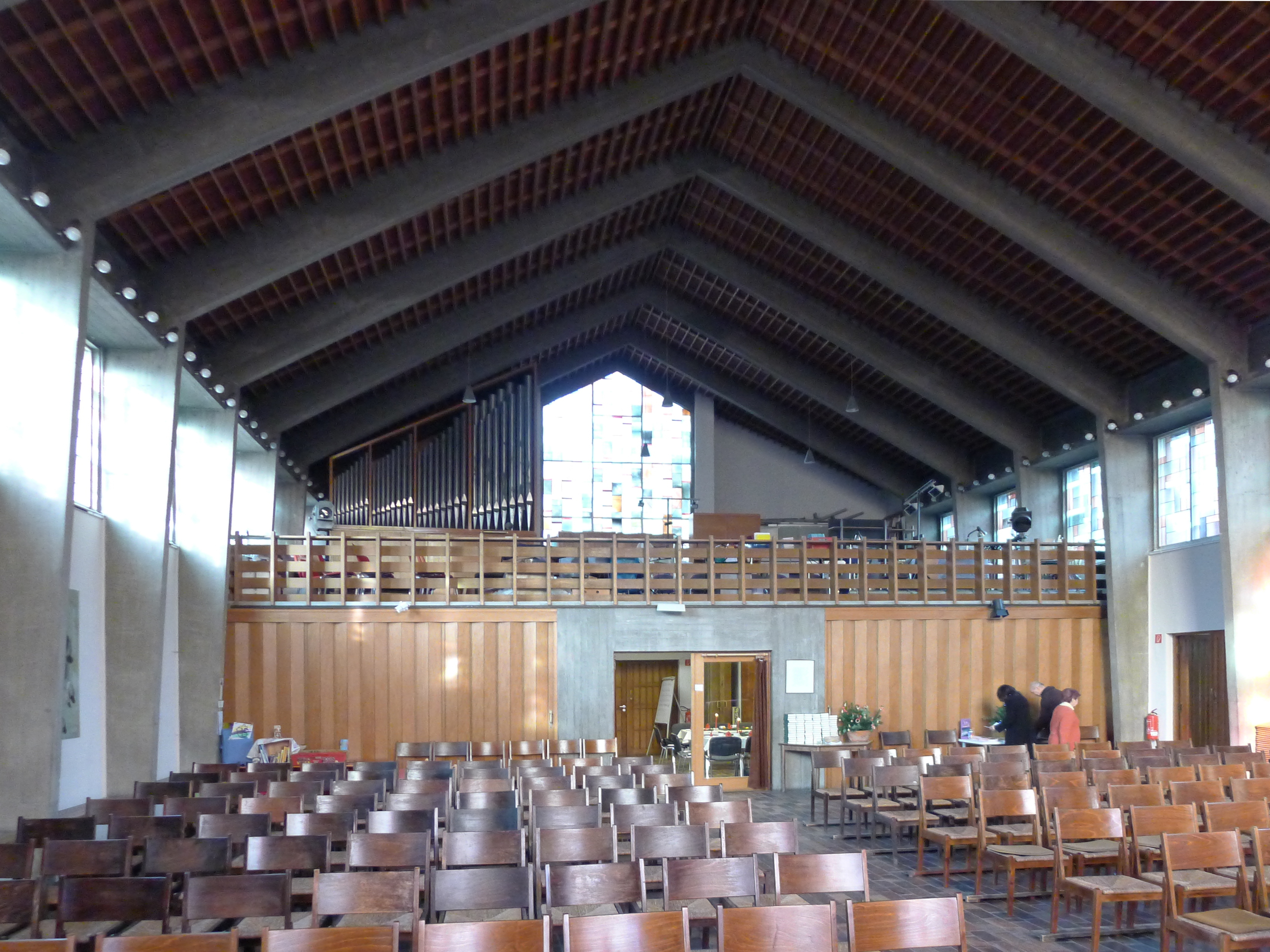 Blick auf die Orgelempore und die darunter liegende Winterkirche